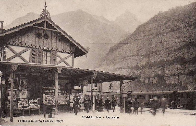 St-Maurice - La gare